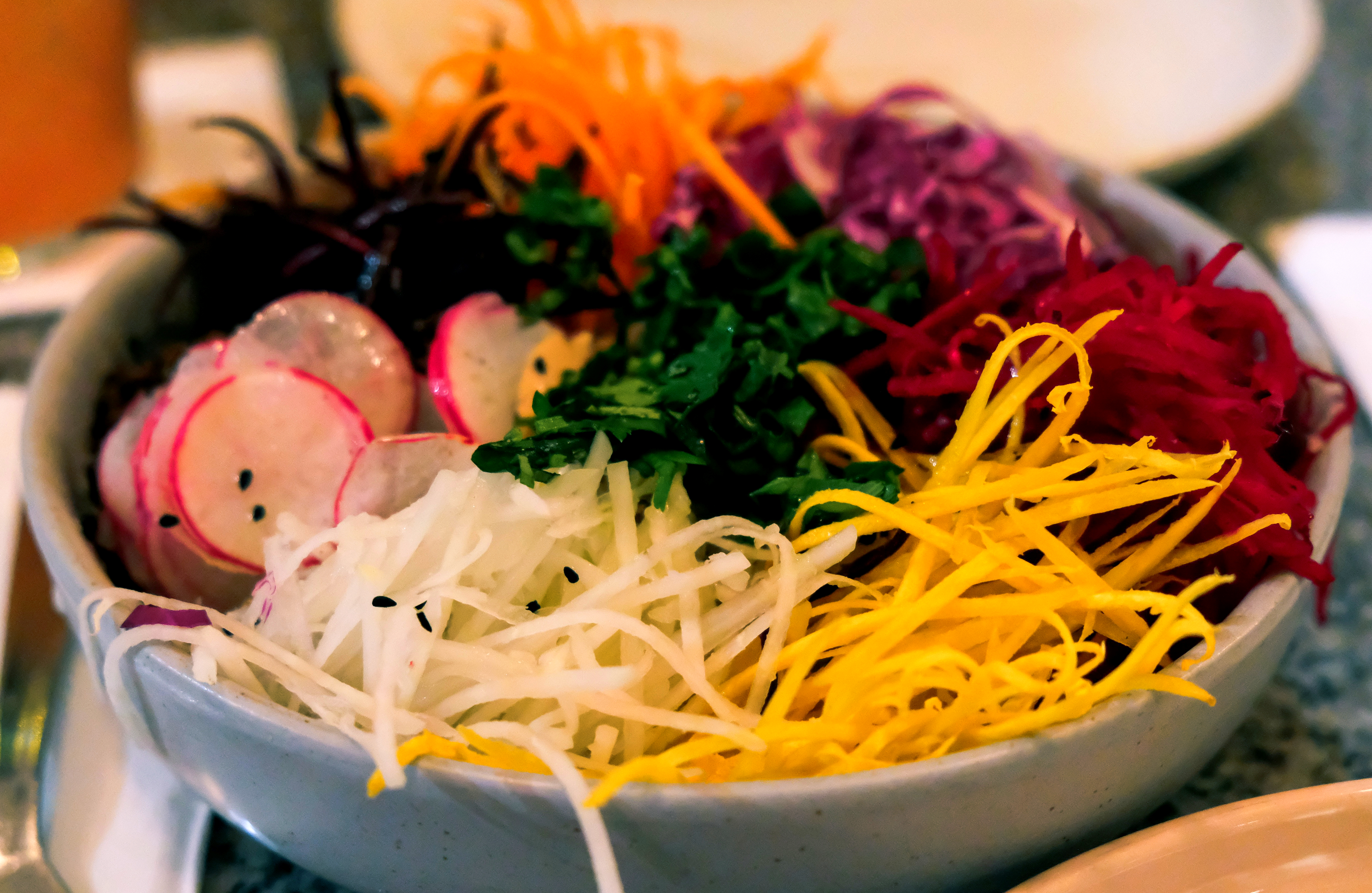 Veggie salad bowl